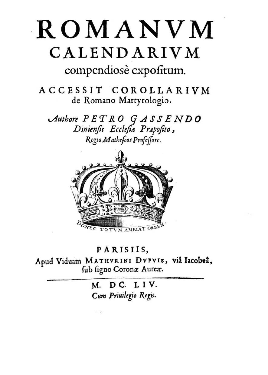 Romanum calendarium compendiose expositum. Accessit corollarium de romano martyrologio. Authore Petro Gassendo .... - Parisiis : apud viduam Mathurini Dupuis, via Iacobea, sub signo Coronae Aureae, 1654. - [16], 189, [1] p. ; 4º . Frontespizio